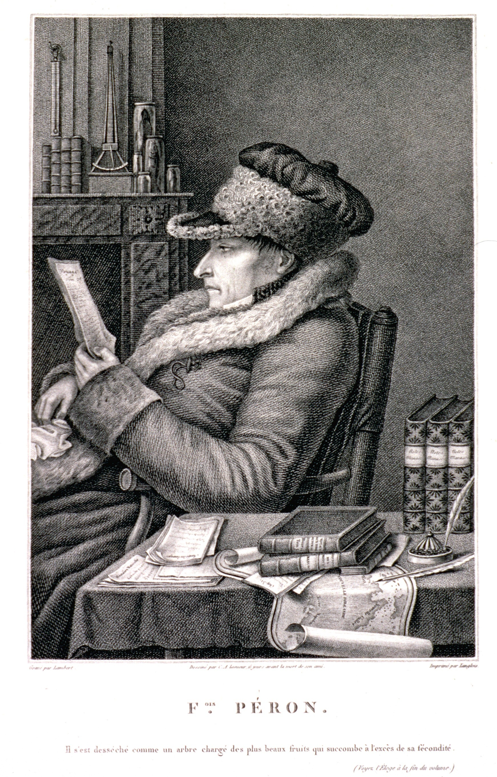 Fois. [i.e. Francois] Peron, engraving by Lambert designed by Lesueur, Charles Alexandre, 1778-1846